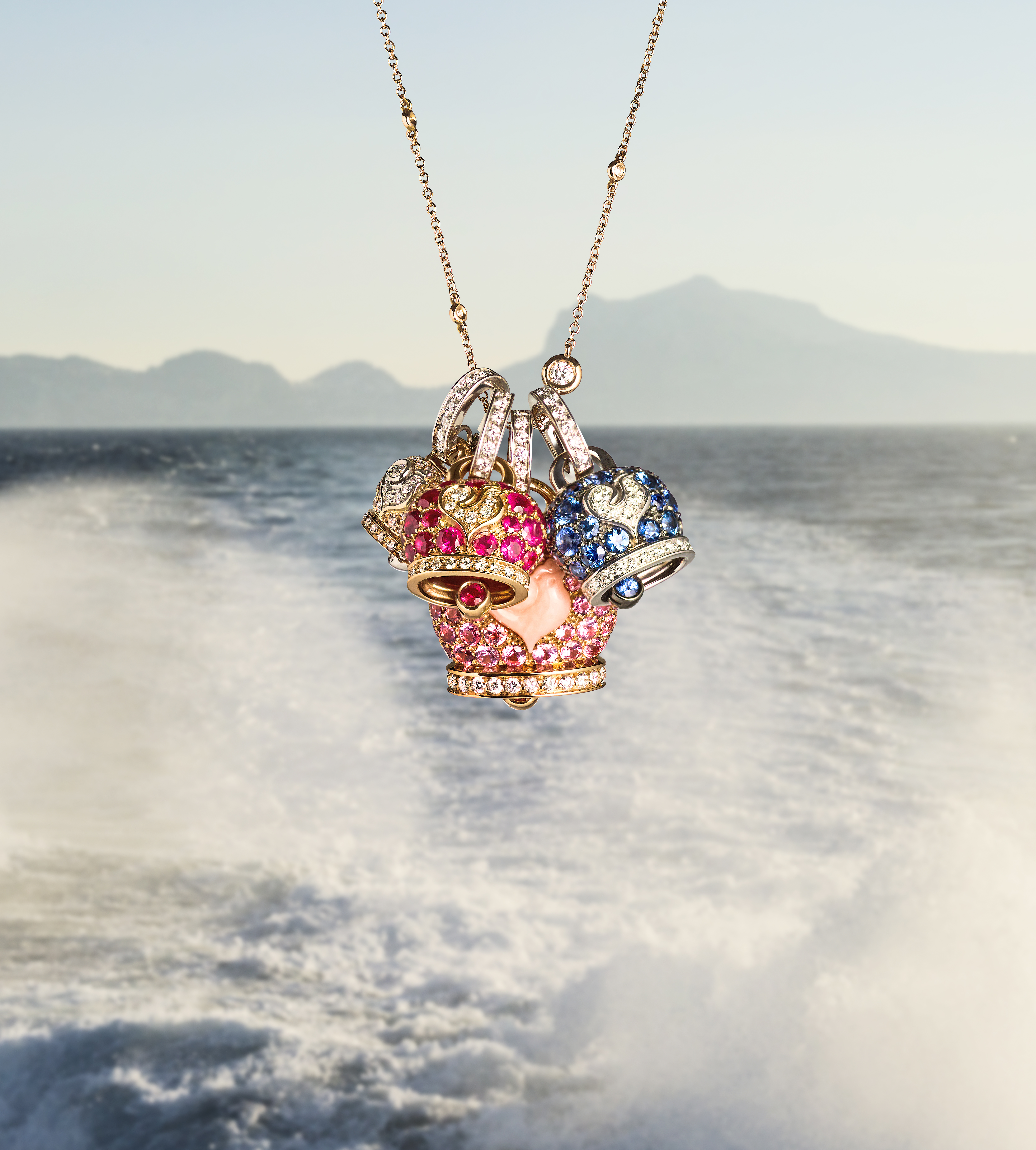 campanelle chantecler